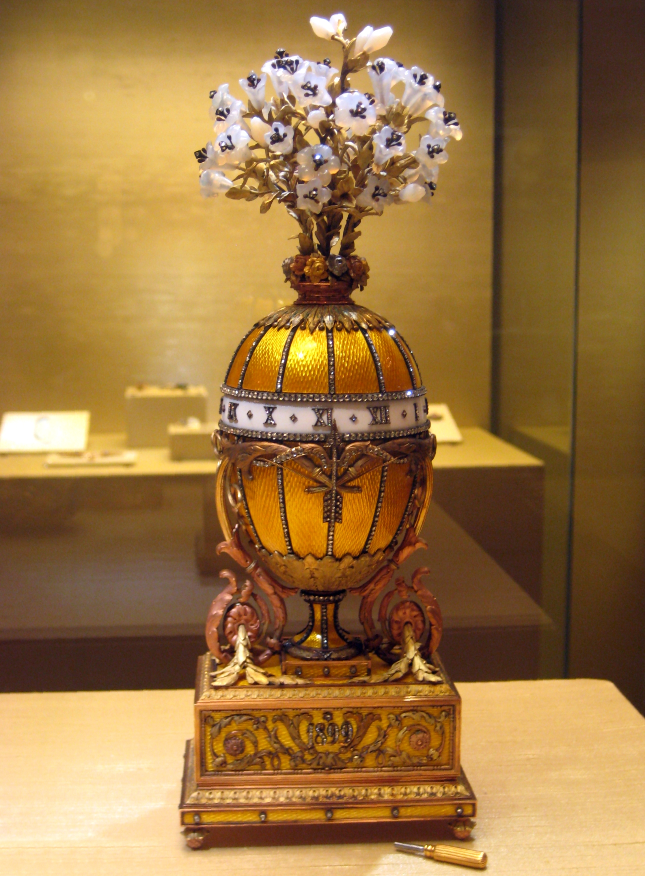 «Часы (Букет лилий)», яйцо Фаберже